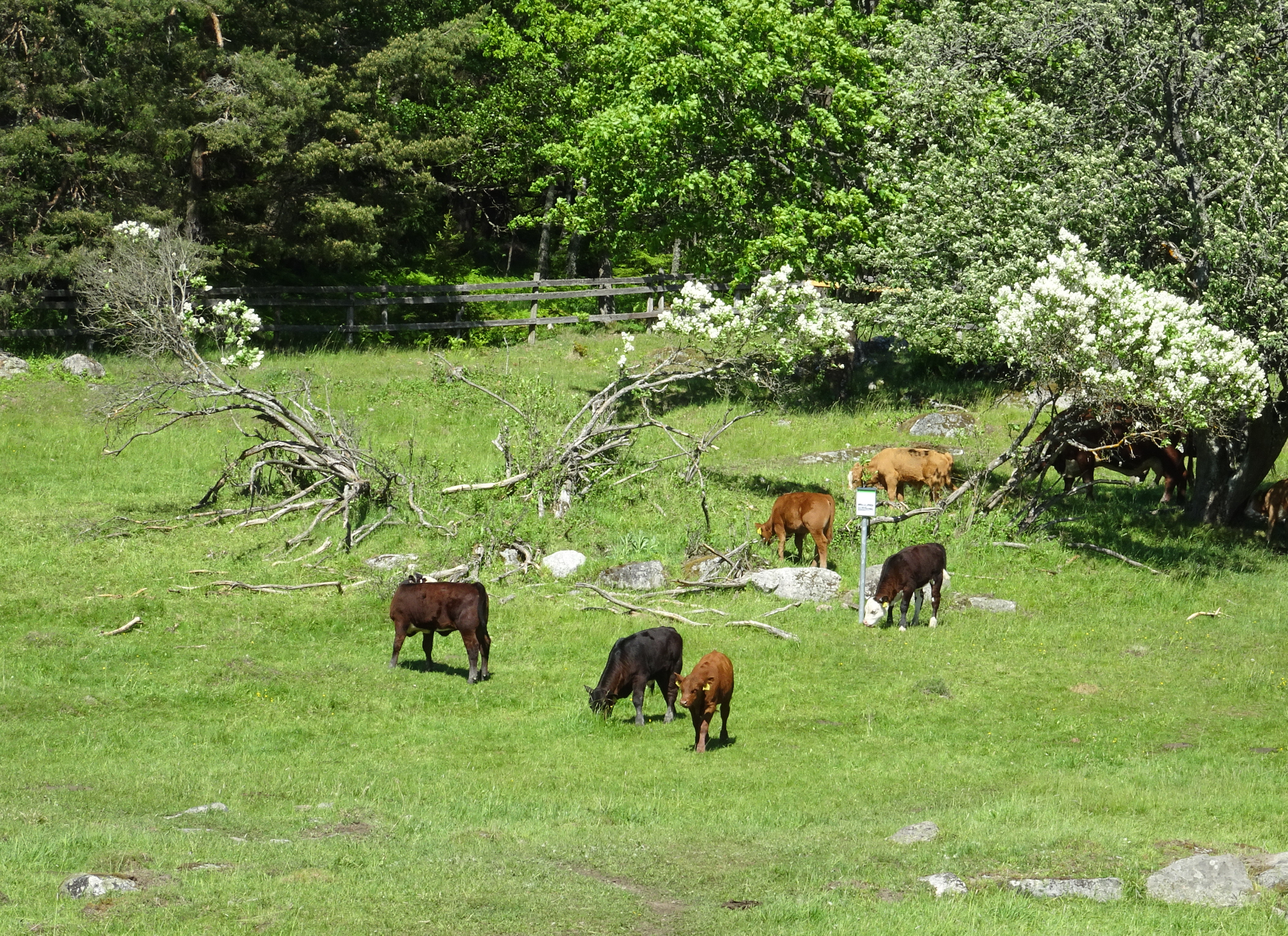 Torpplats Nysved i Västra Järvafältets naturreservat